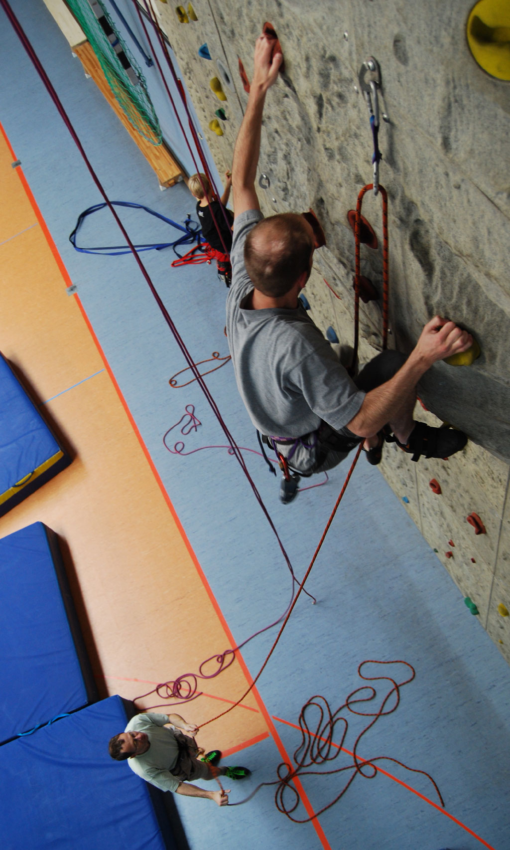 Ein Sportkletterer im Vorstieg in einer Kletterhalle.